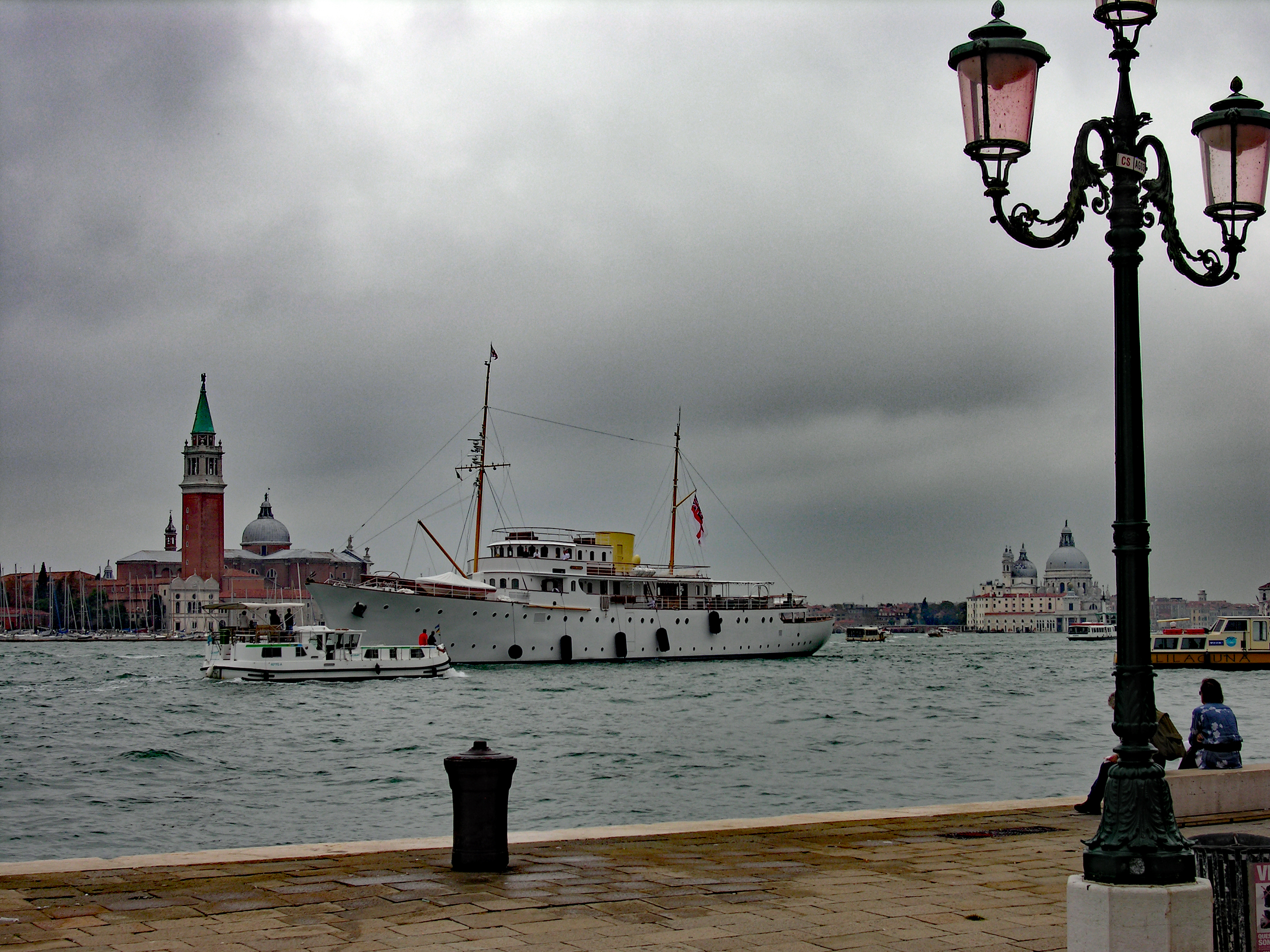 Castello, 30100 Venezia, Italy